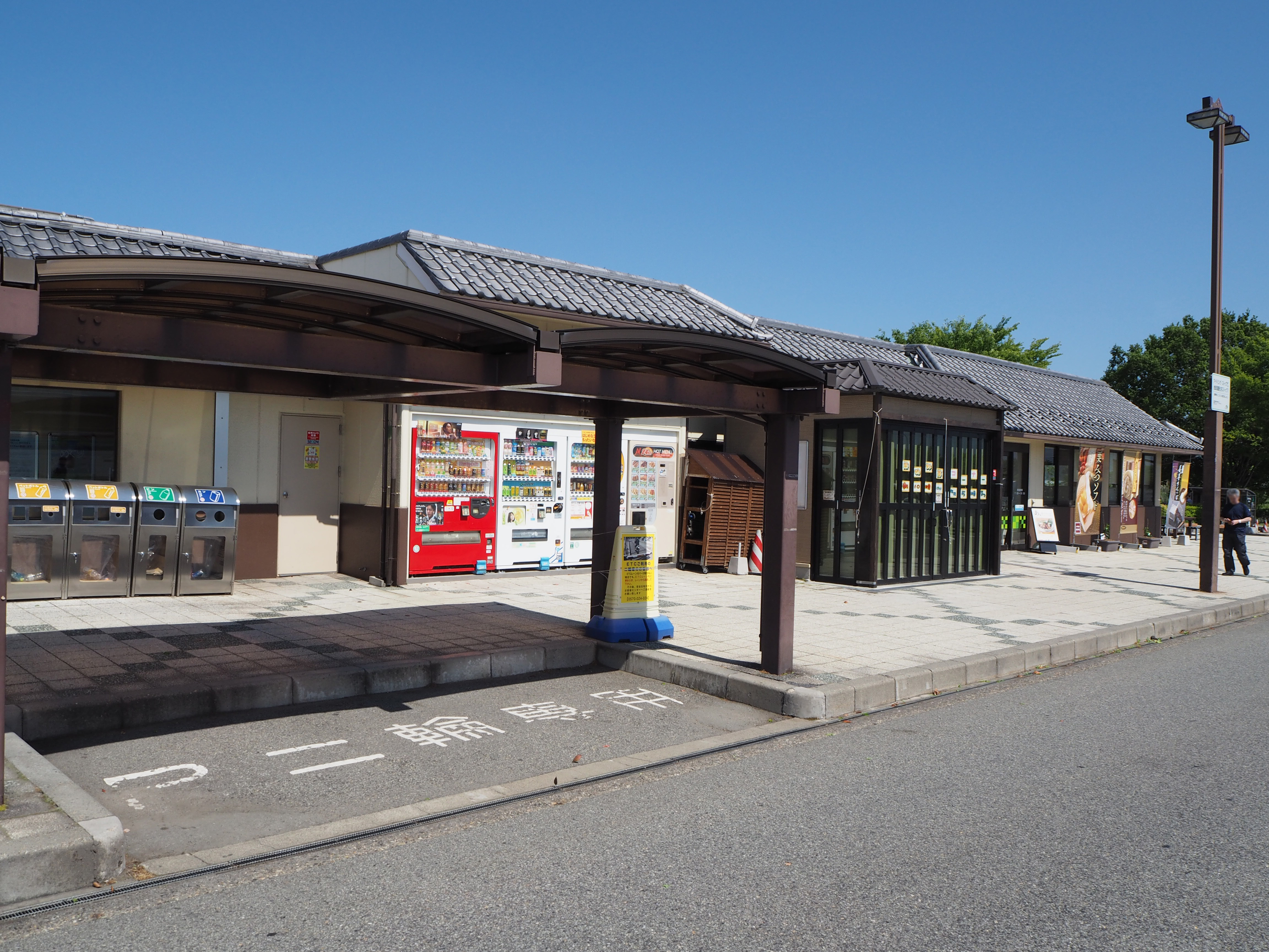 小布施パーキングエリア下り線施設